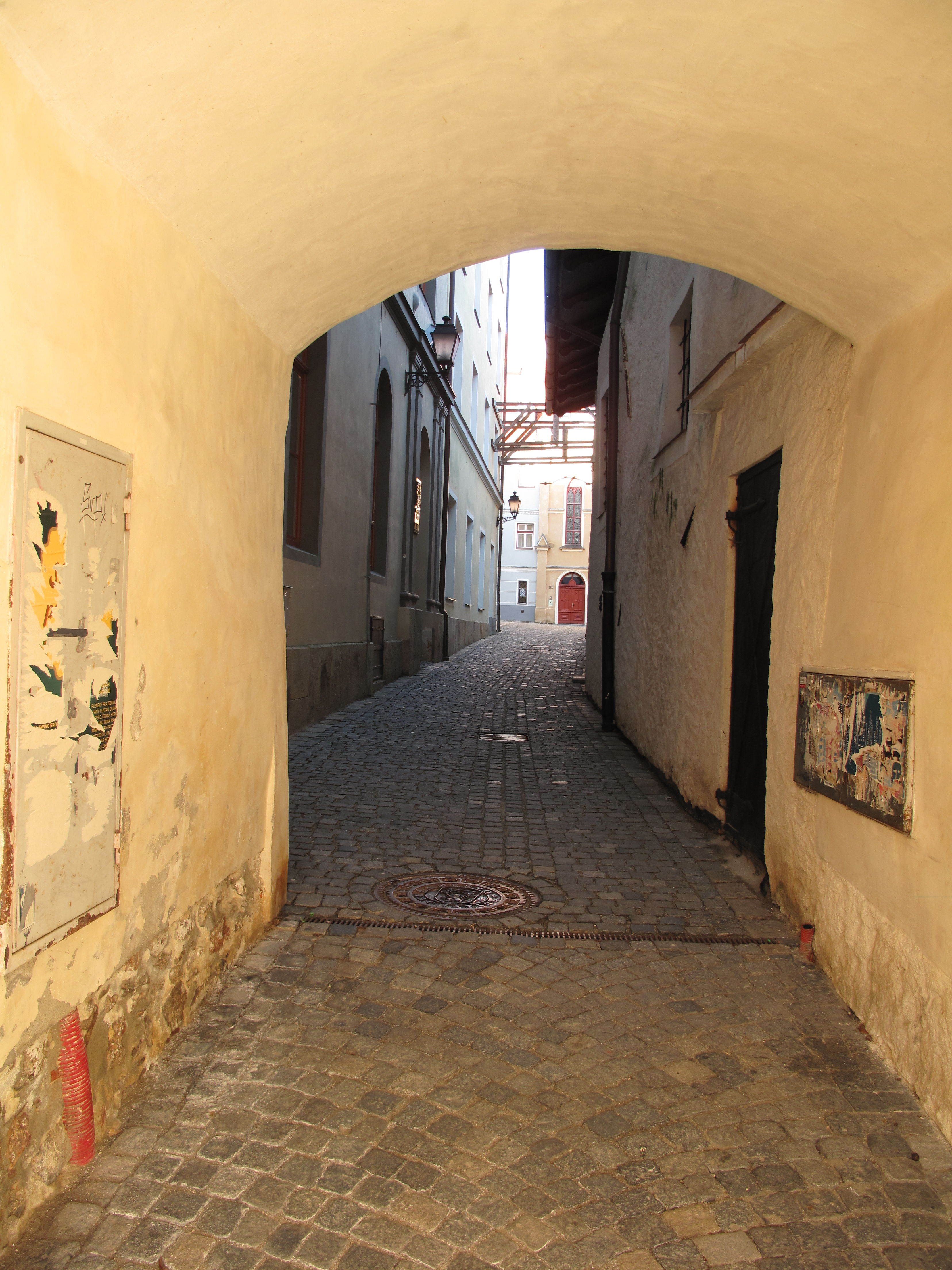 Klášterní ulice v Prachaticích